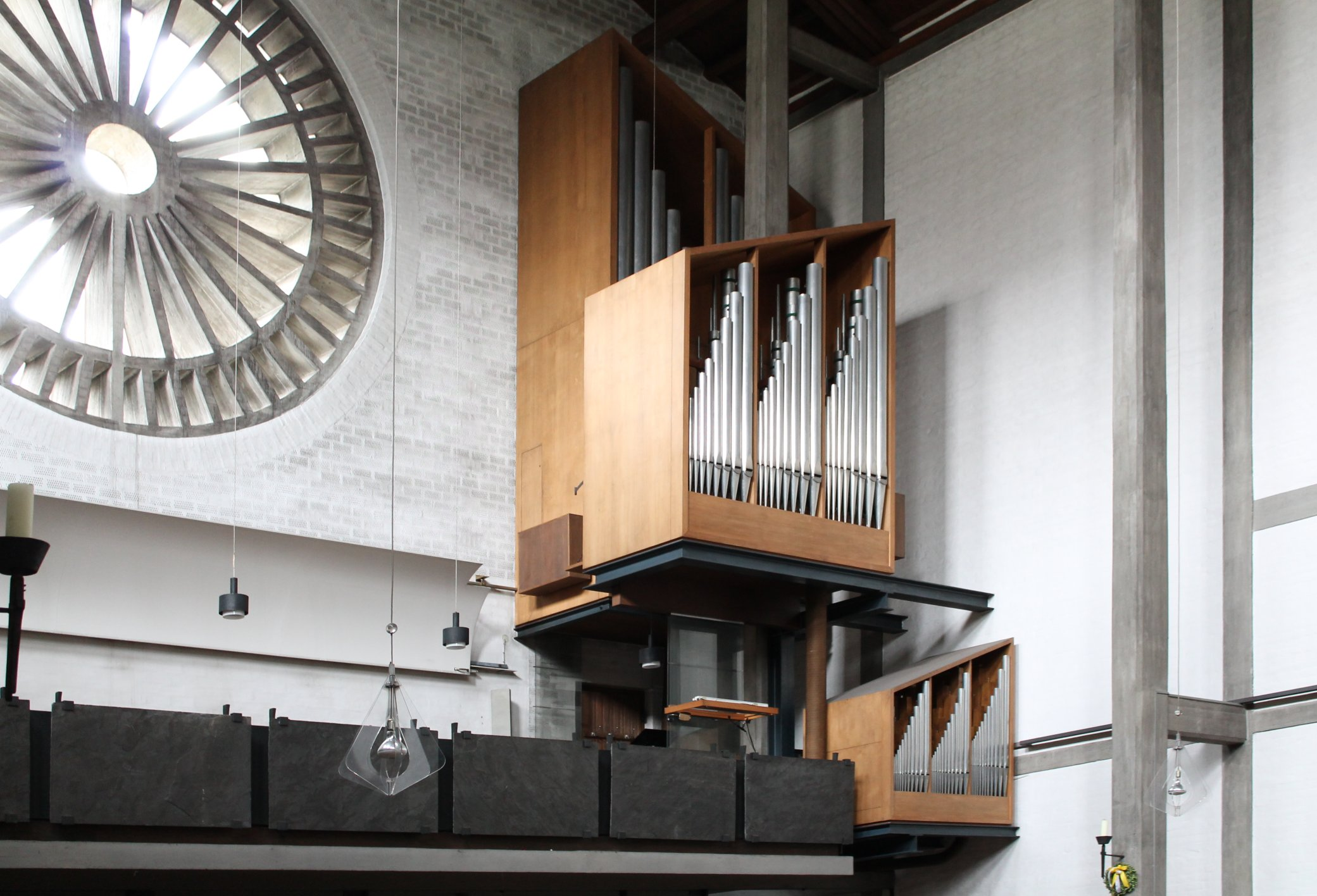 Orgel von Maria vom guten Rat in München (1964, Karl Schuke op. 141, II/26)